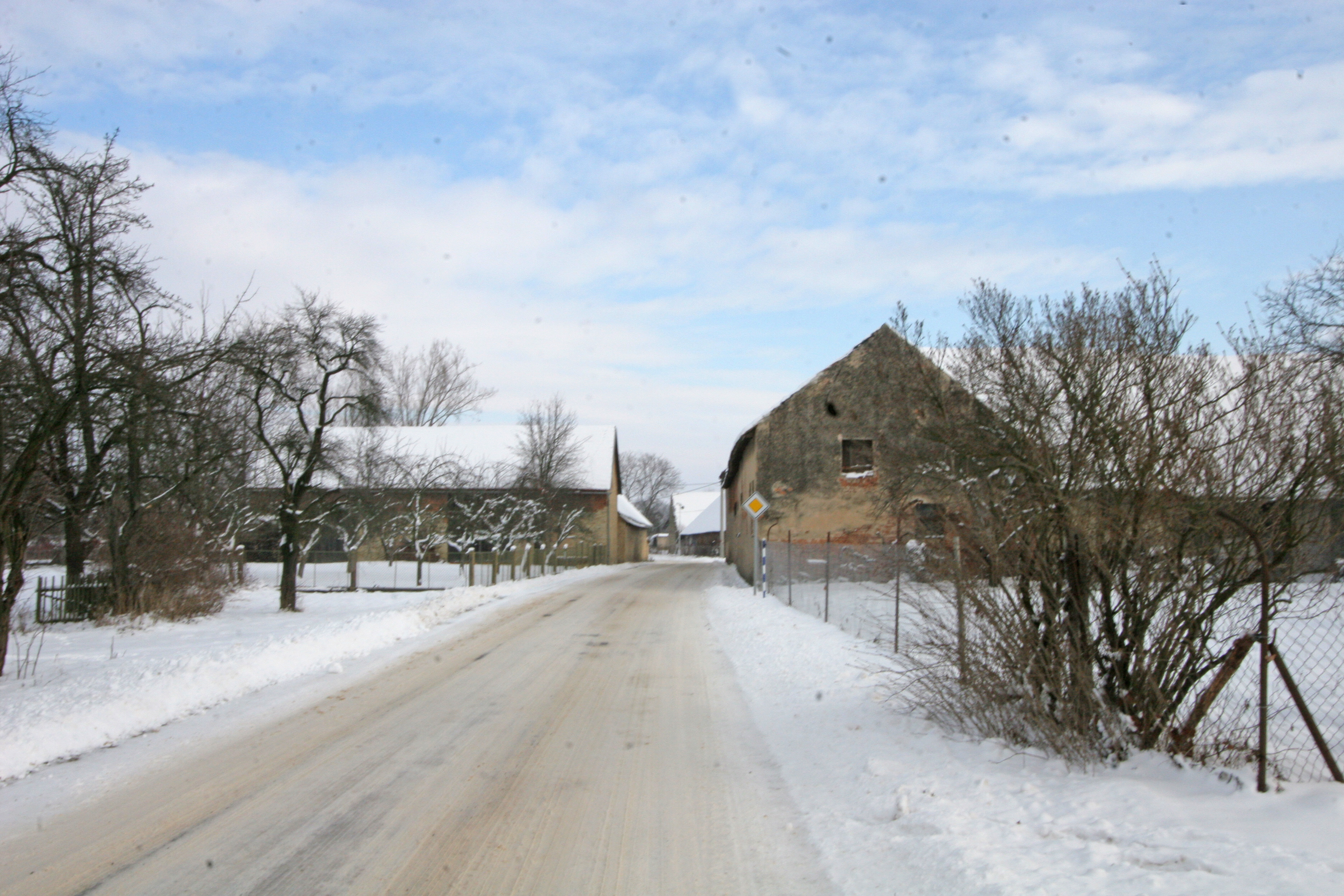 Mentour - příjezd od Poděčel